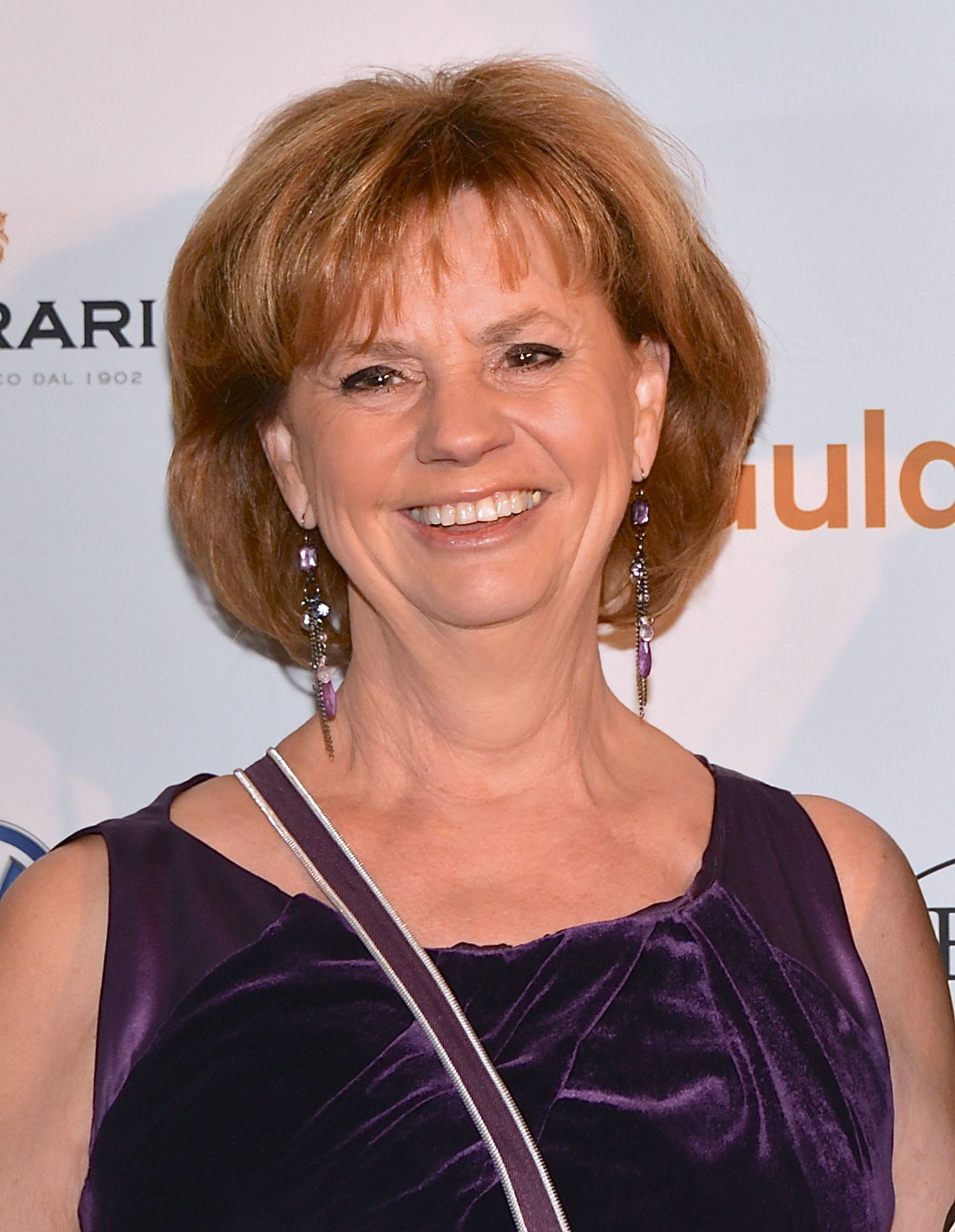 Marianne Rundström på Guldbaggegalan den 21 januari 2013.